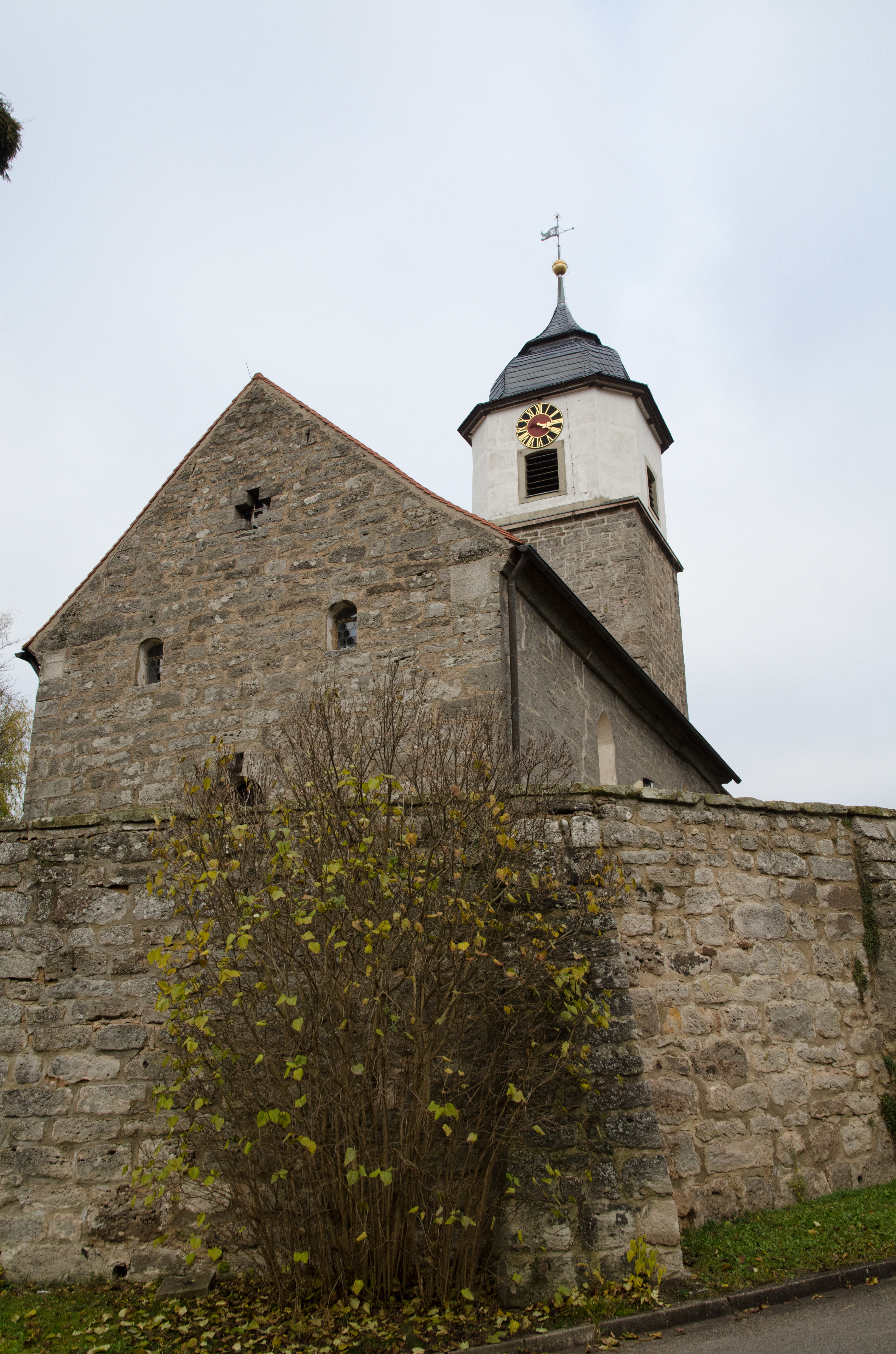 Urphertshofen, Evang.-Luth. Kirche St. Jakobus und Nikolaus